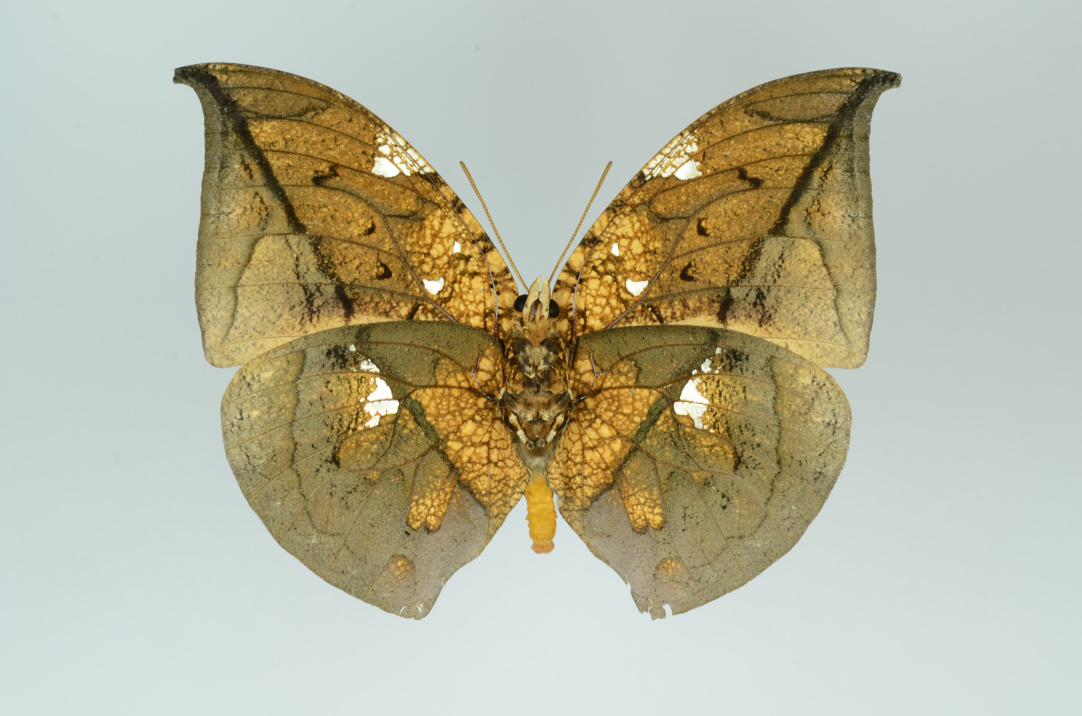 Nymphalidae eastern Ecuador